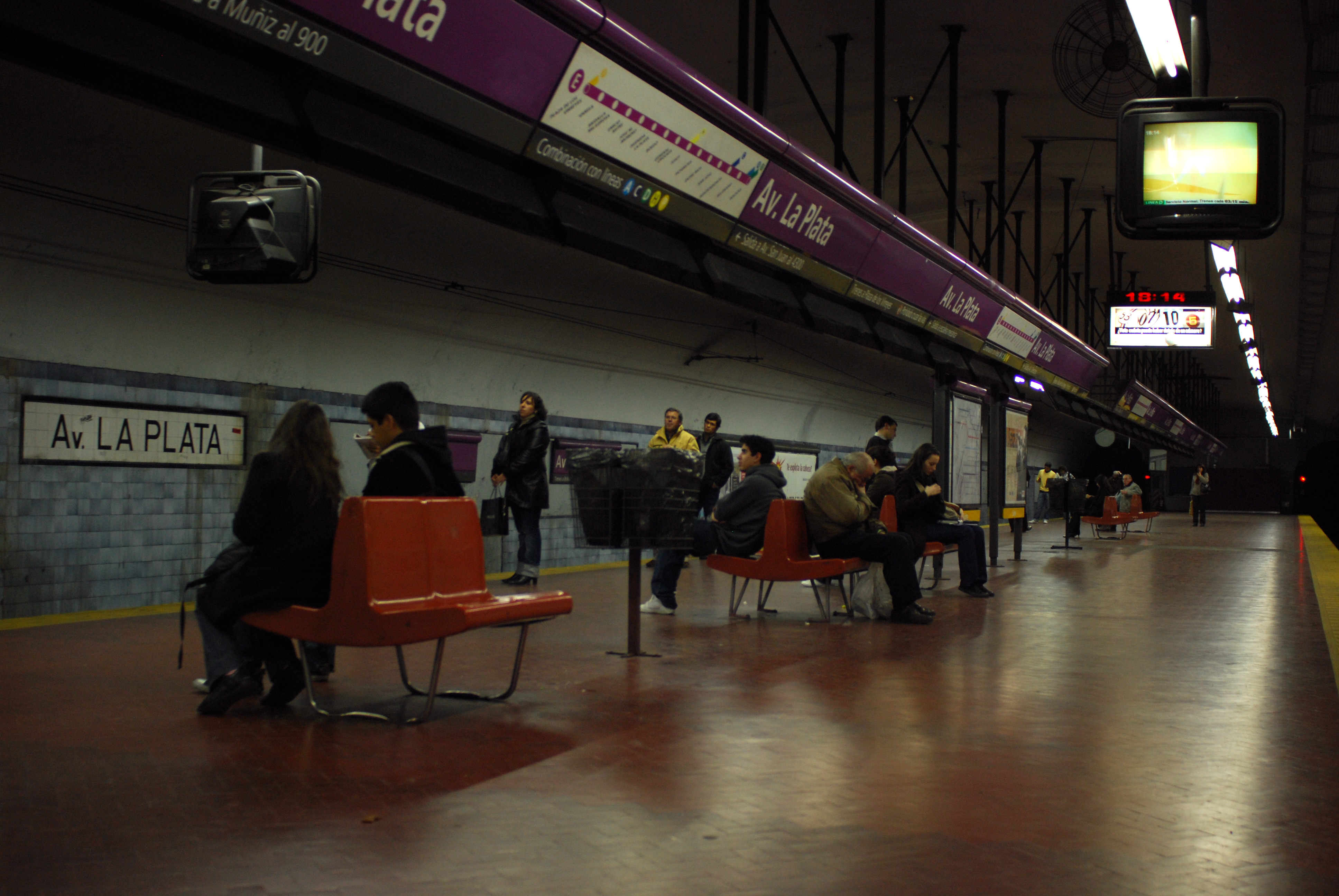 andenes de la estación Av. La Plata de la línea E de subtes en Buenos Aires, Argentina.